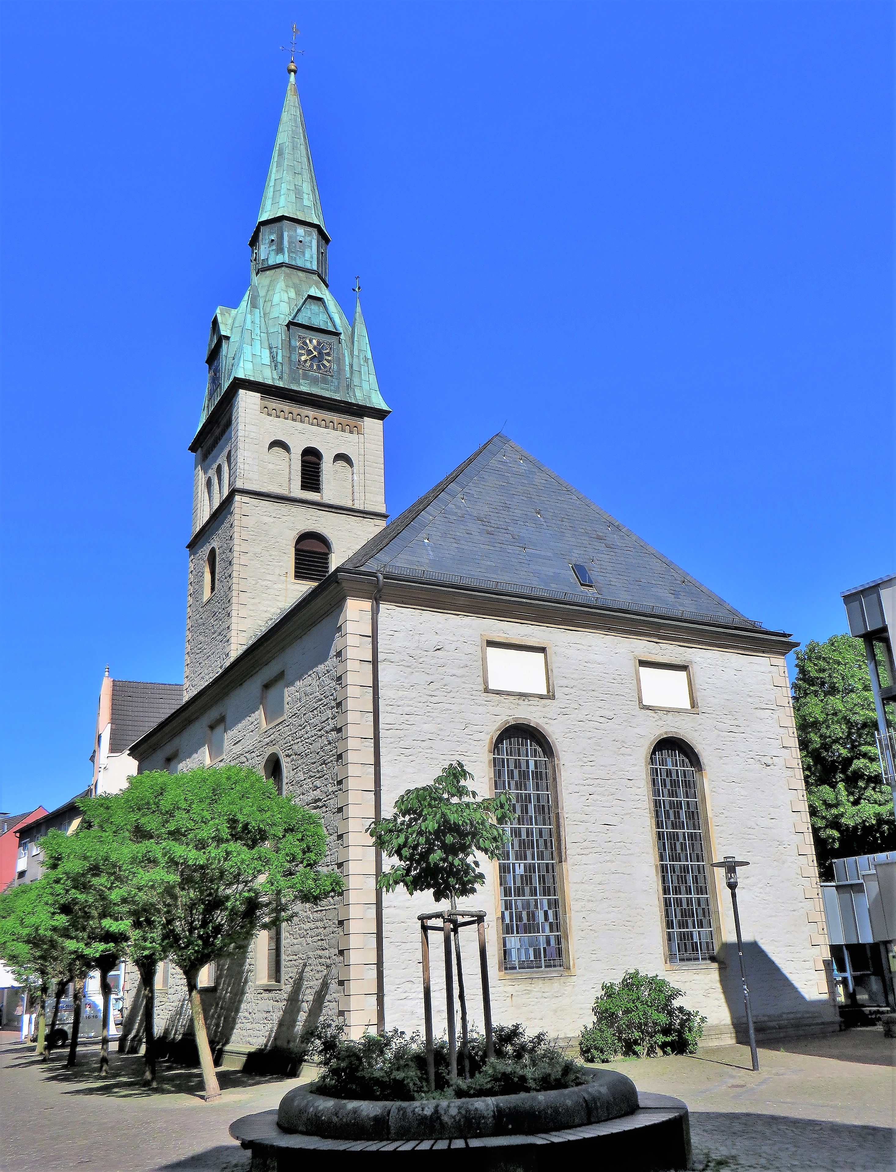 Denkmalgeschützte ev.-ref. Kirche in Hagen-Hohenlimburg, Freiheitstraße. Hallenkirche; erbaut und gefördert 1749/51 von Landesherr und Patron Graf Moritz Casimir I. zu Bentheim-Tecklenburg sowie weiterer Stifter (Kollekte). Die ehemalige gräfliche Hofkirche hat die für reformierte Gotteshäuser typische Bauform: ein großer, rechteckiger Raum mit hohen Fenstern, lichtdurchflutet. Die Ausschmückung des Kirchenraums ist einfach und schlicht, nur die bemalte Holzdecke, die kunstvoll geschnitzte Kanzel und der Orgelprospekt zeugen von barocker Prachtentfaltung. Patronatskirche des Fürsten zu Bentheim-Tecklenburg. This is a photograph of an architectural monument.